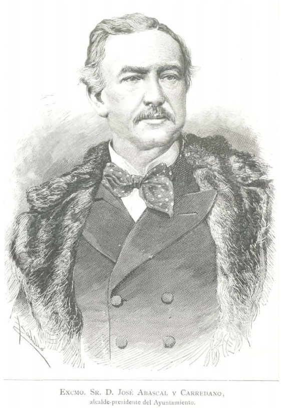 Excmo. Sr. D. José Abascal y Carredano, alcalde presidente de Madrid.